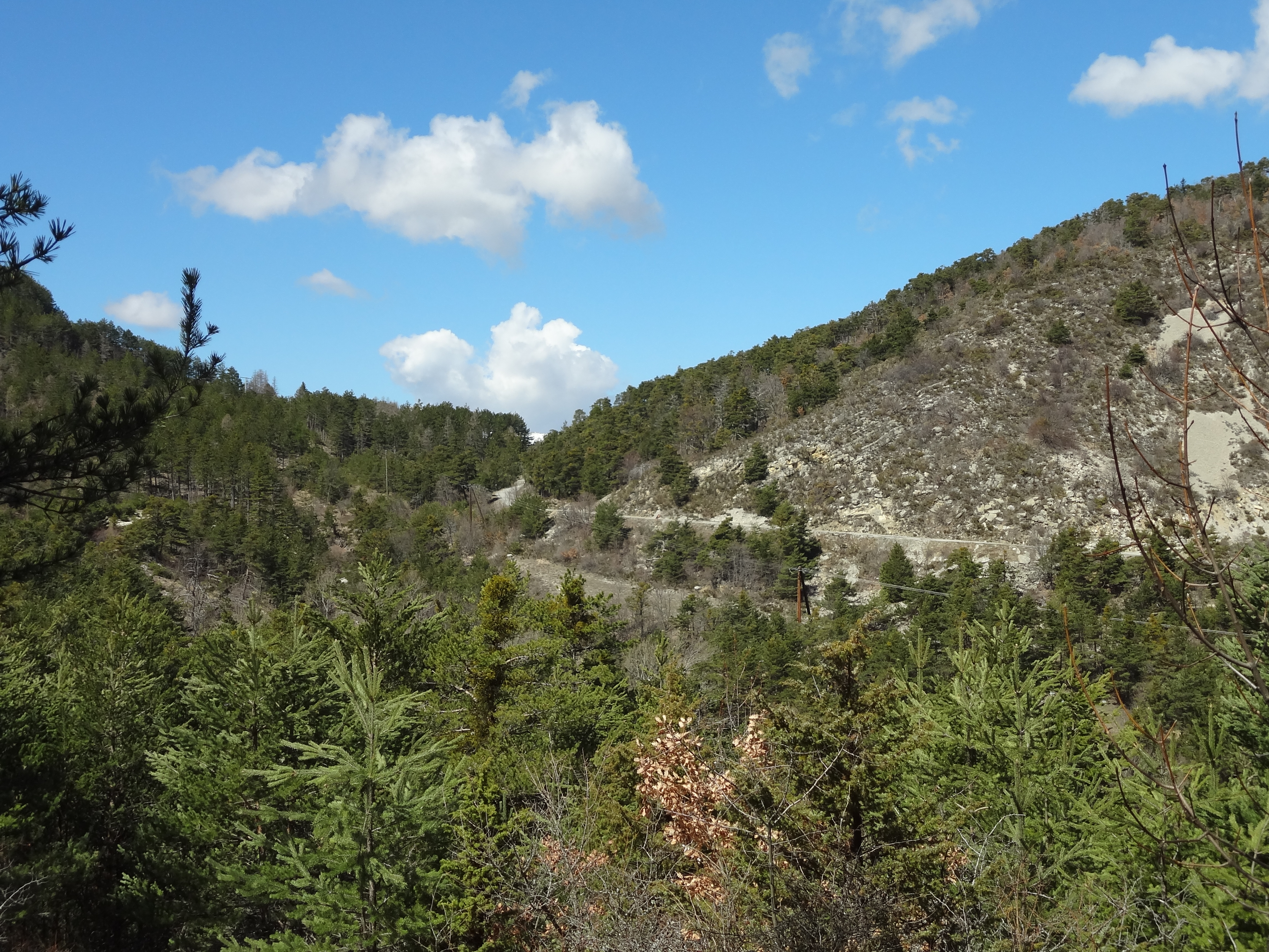 Col du Deffens sur la D219 entre Lambruisse et Tartonne